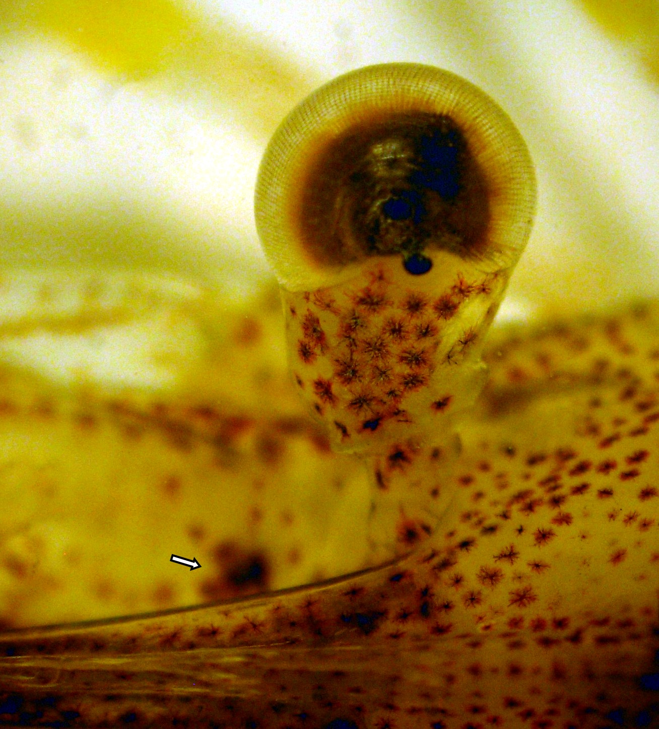 Oeil comosé et emplacement du statocyste chez la crevette Palaemon adspersus.